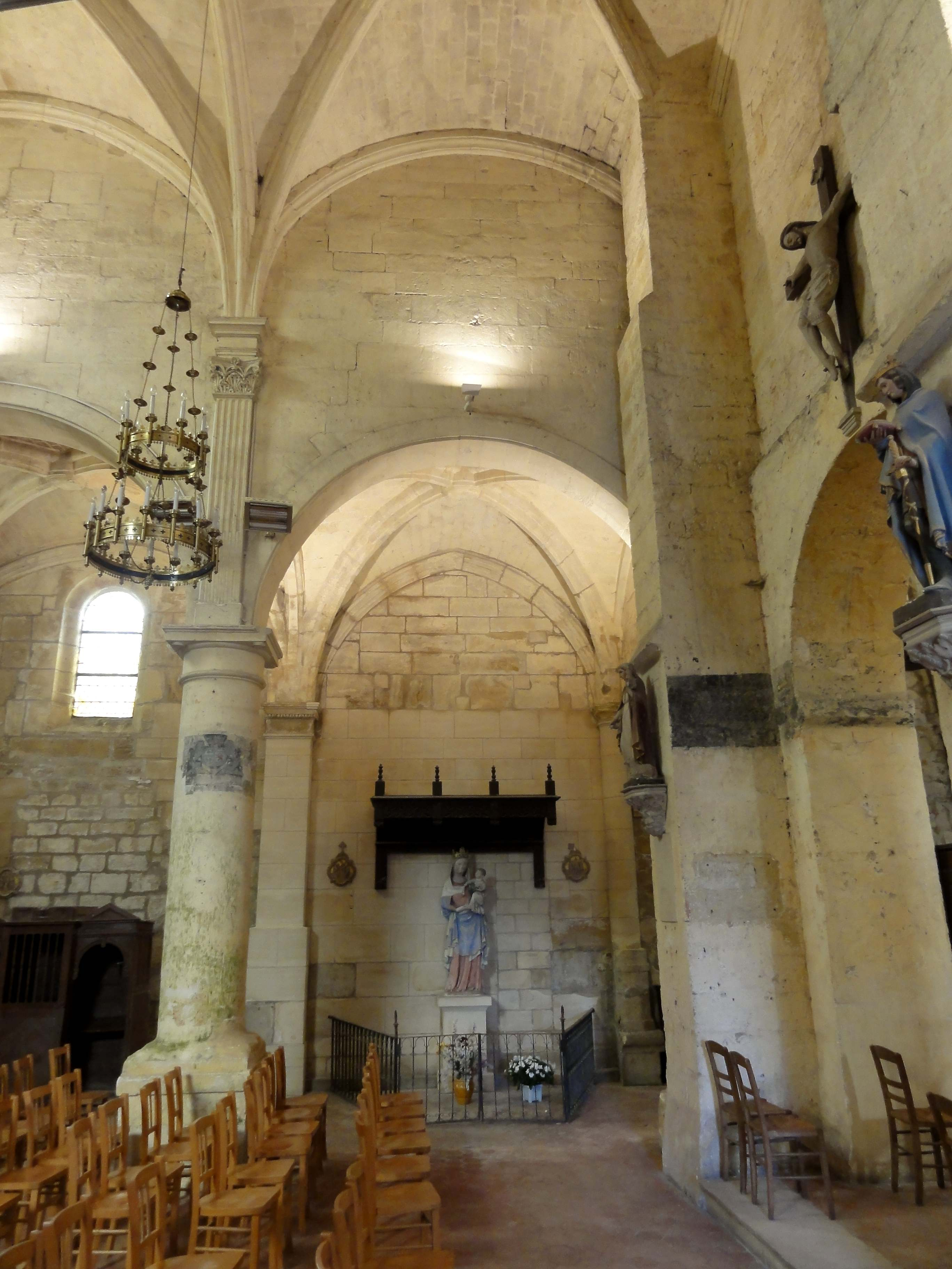 Intérieur de l'église (voir titre).